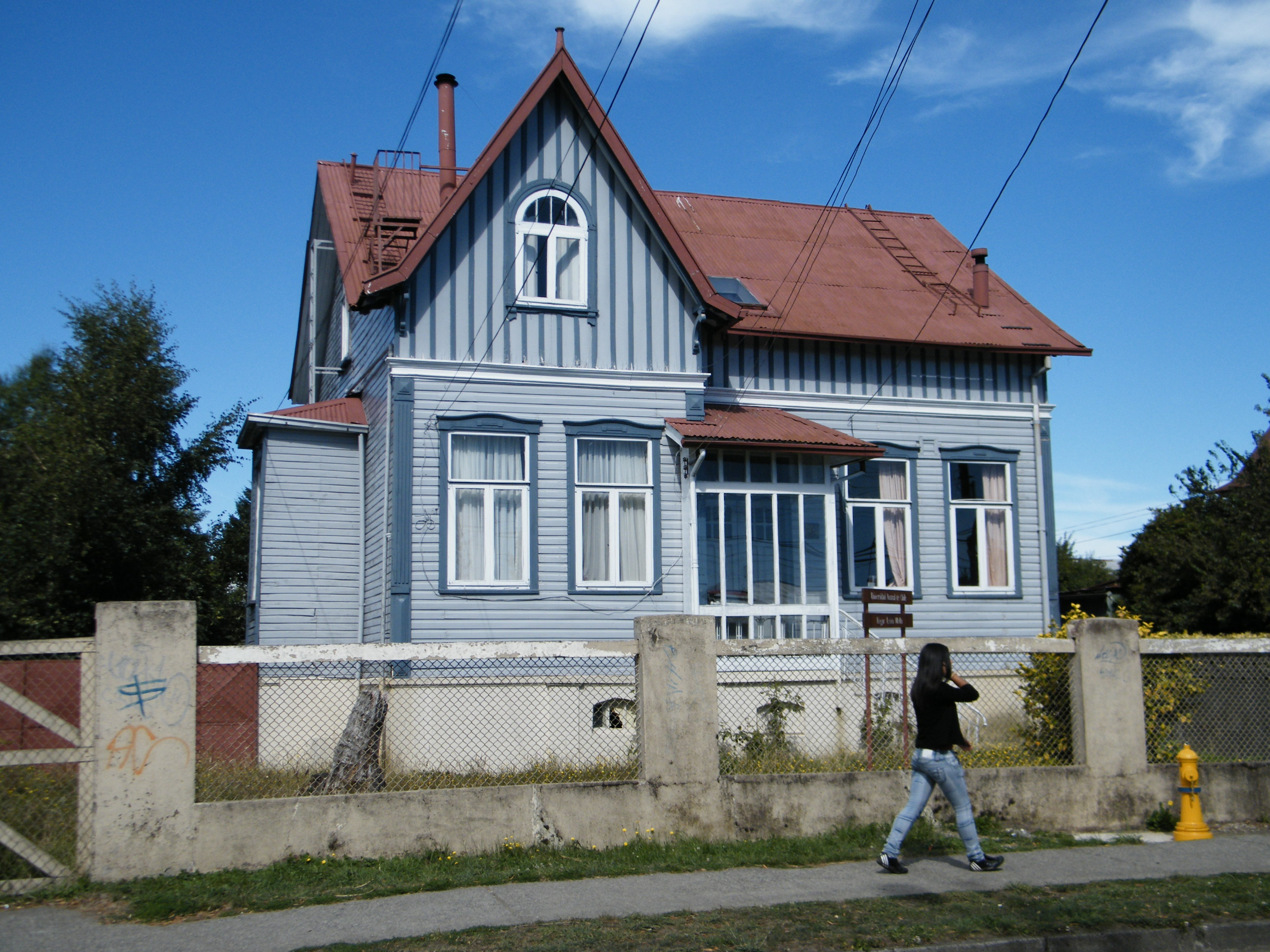 Calle General Pedro Lagos, Valdivia. This is a photo of a national monument in Chile: 733